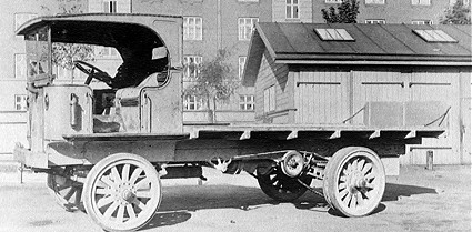 4-тонный грузовик Garford 4x2